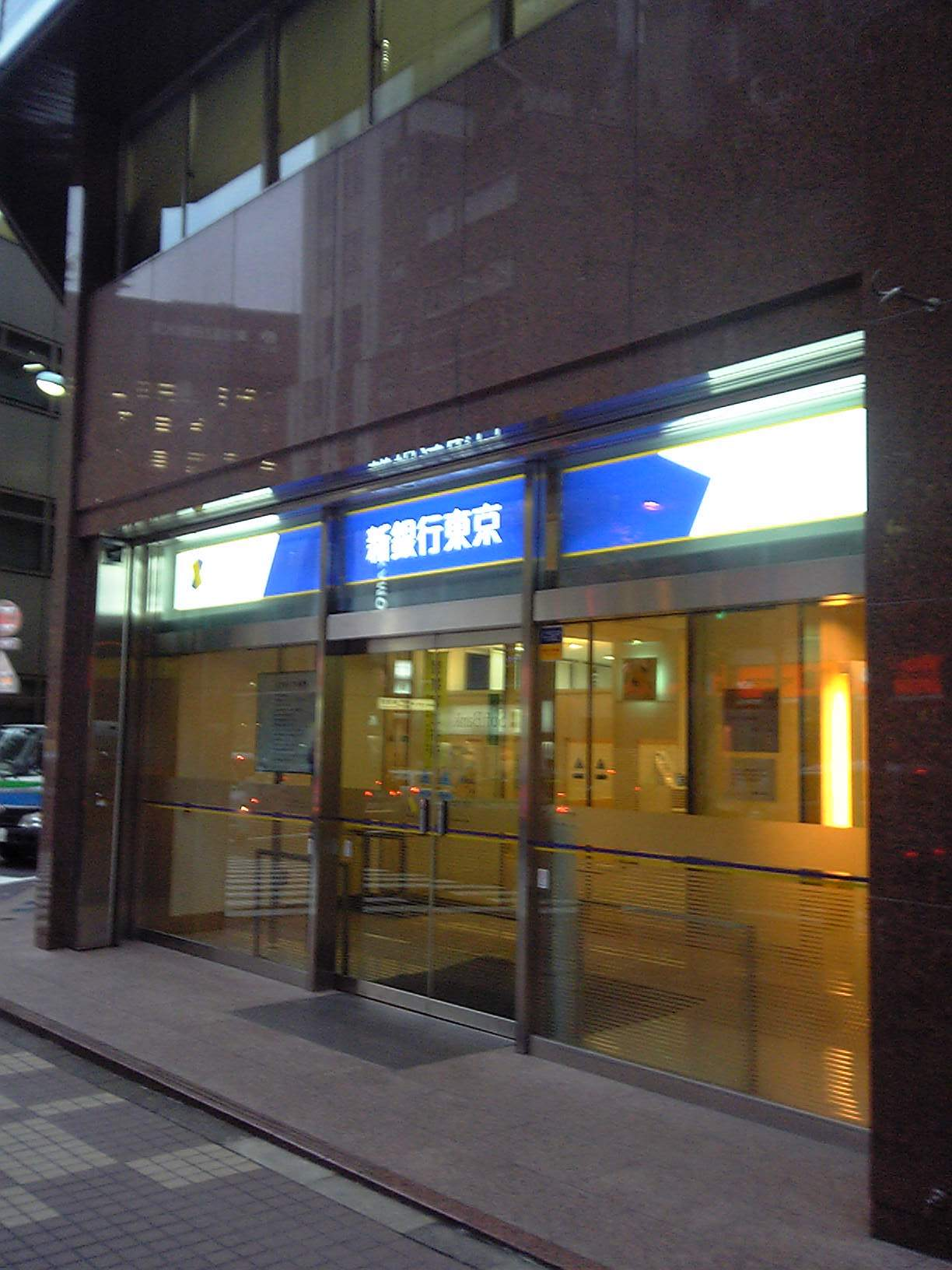 新銀行東京本店